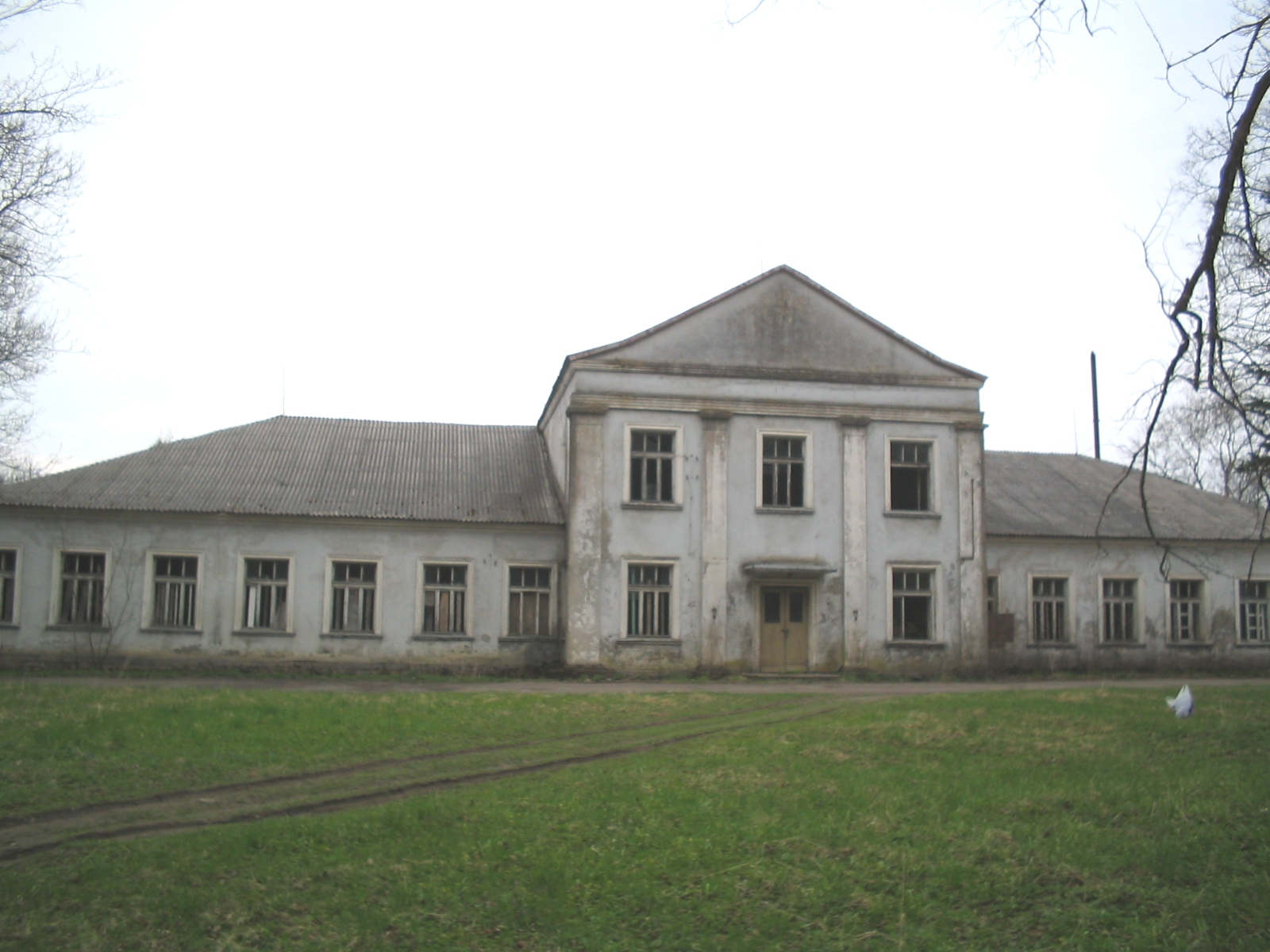 1967-1989 m. Švėkšnos spec. mokykla